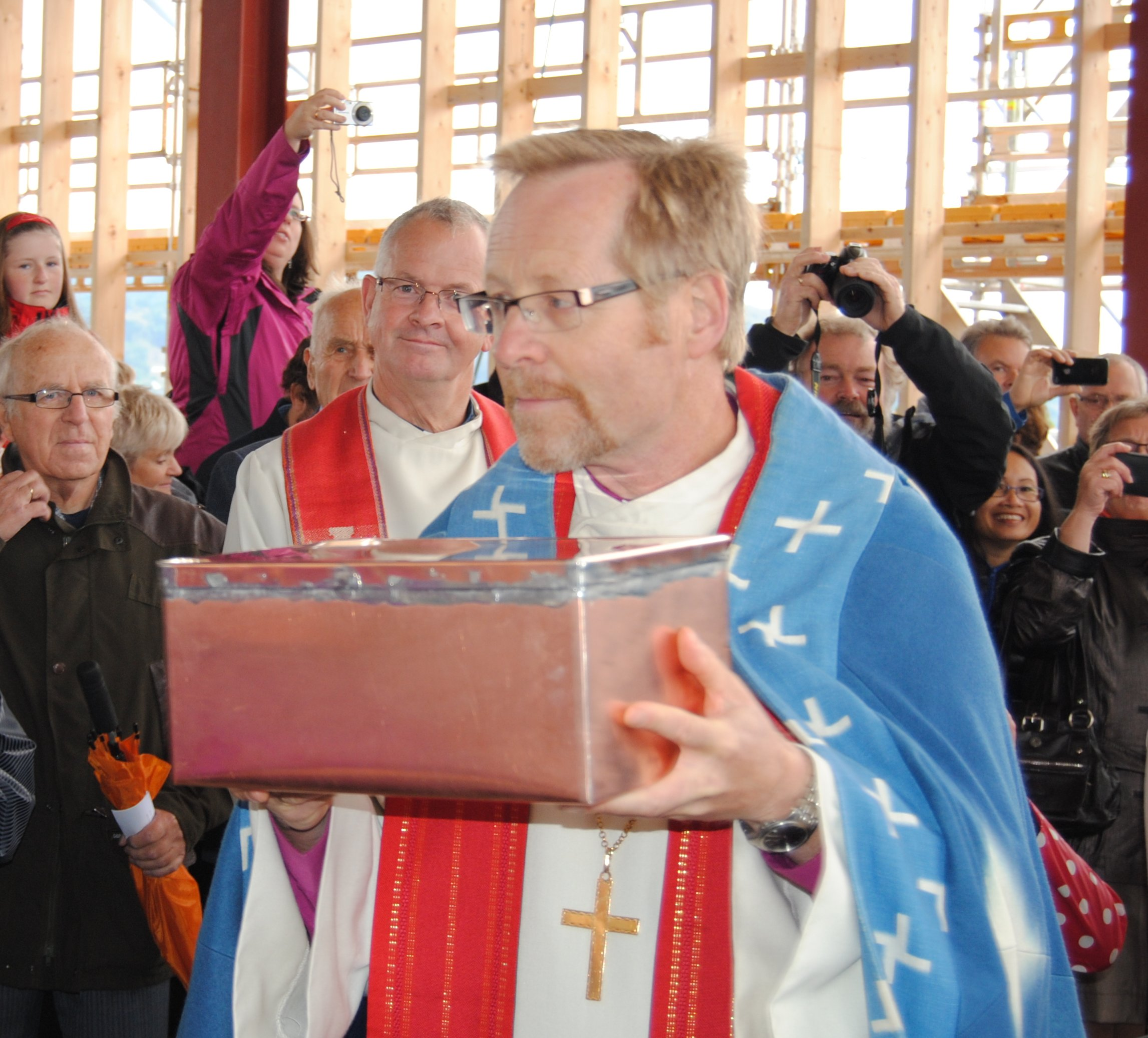 Biskop Halvor Nordhaug legg ned grunnsteinen i Knarvik kyrkjeNorsk bokmål: Bishop Halvor Nordhaug lays the founding stone i Knarvik church